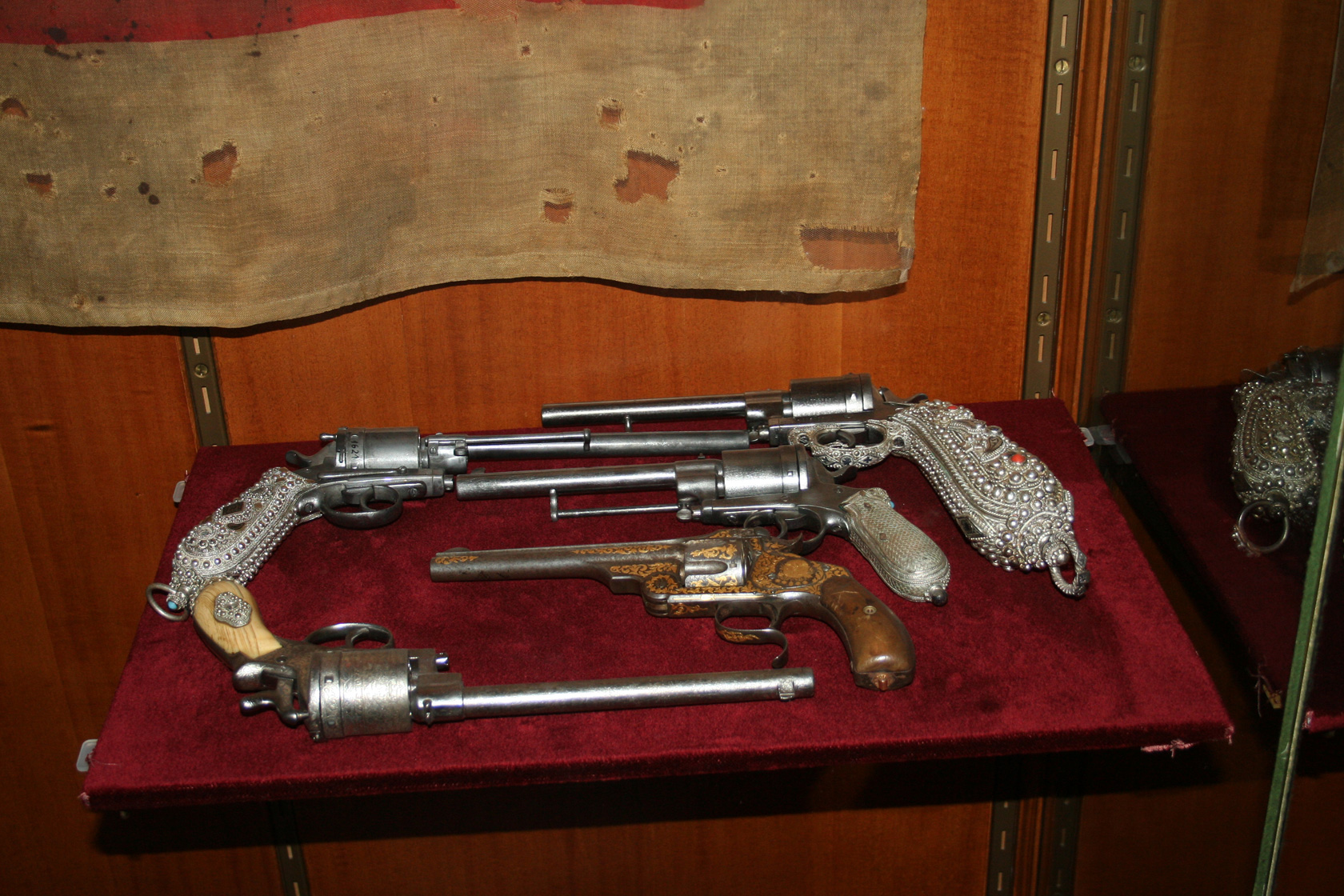 jewel handled guns. Taken from michael tyler -geoblog.